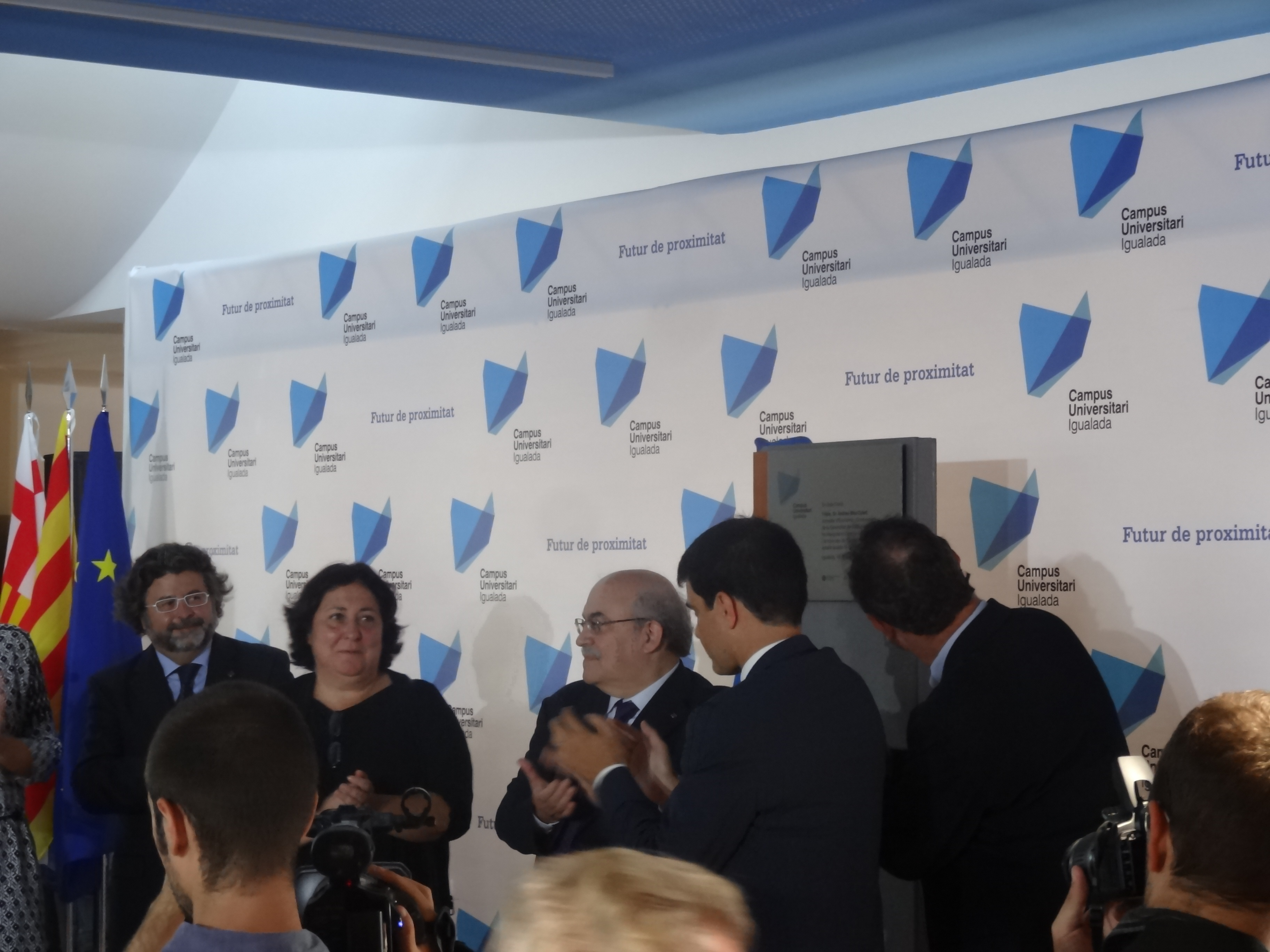 Acte d'Inauguració de l'Escola d'Enginyeria d'Igualada al nou Campus Universitari (18 de setembre de 2014). D'esquerra a dreta: Antoni Castellà, secretari d'Universitats i Recerca, Diana Cayuela, delegada de la UPC, Andreu Mas-Colell, conseller d'Economia i Coneixement, Marc Castells, alcalde d'Igualada, i Lluís Jofre, president del Consorci de l'Escola Tècnica d'Igualada (CETI) i director general d'Universitats.